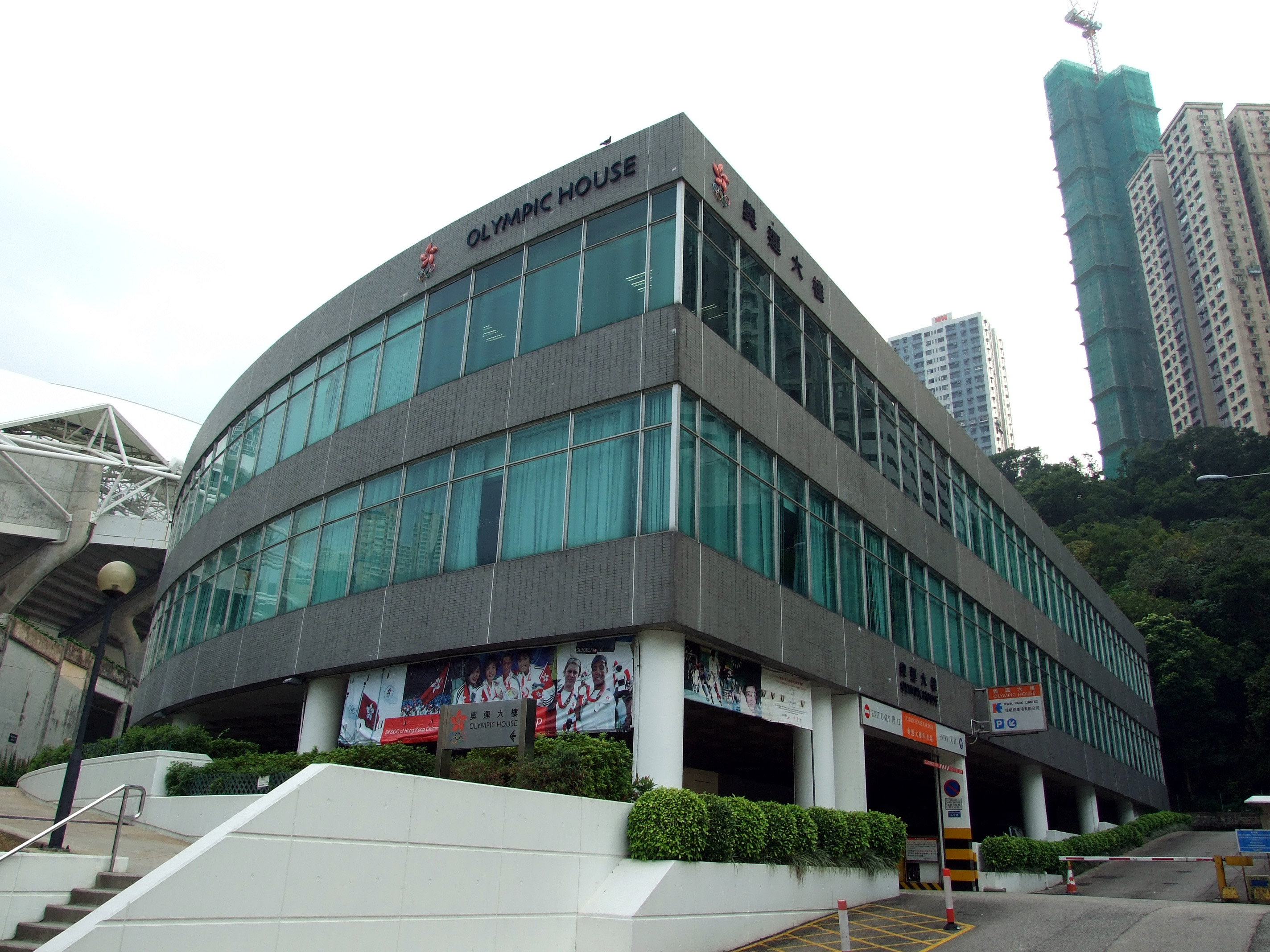 中文（香港）: 奧運大樓